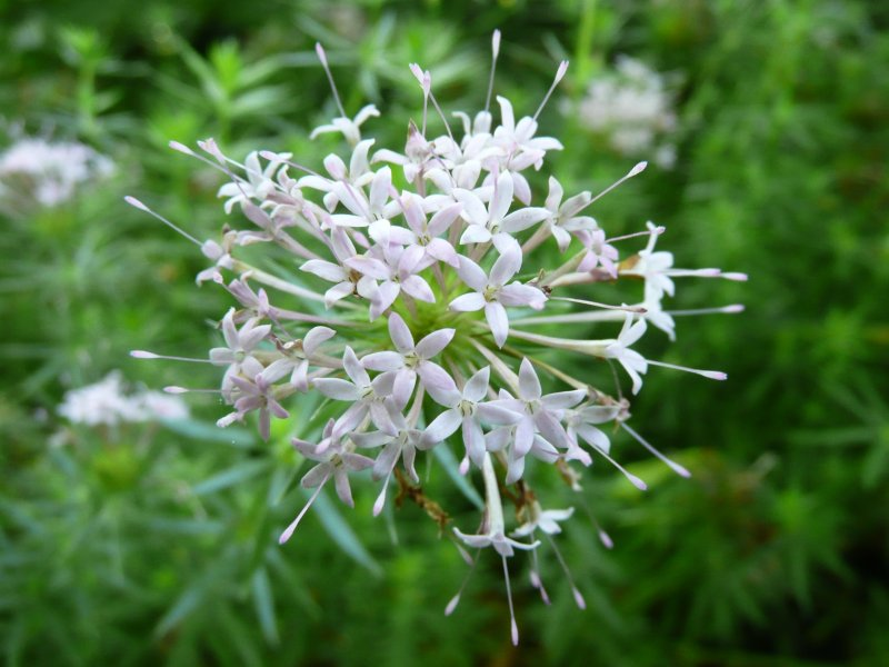 Botanischer Garten Erlangen, 2008